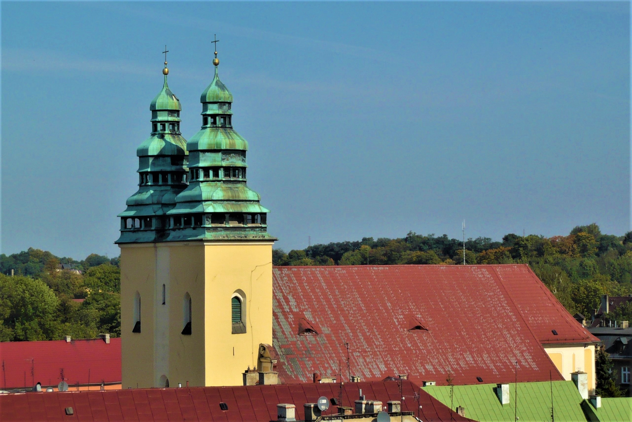 Głuchołazy. Kościół św. Wawrzyńca